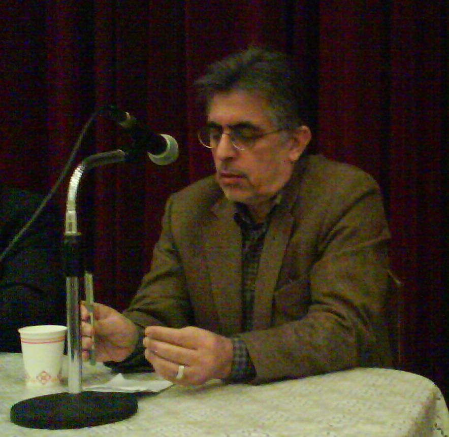 Gholamhossein Karbaschi, Sharif University